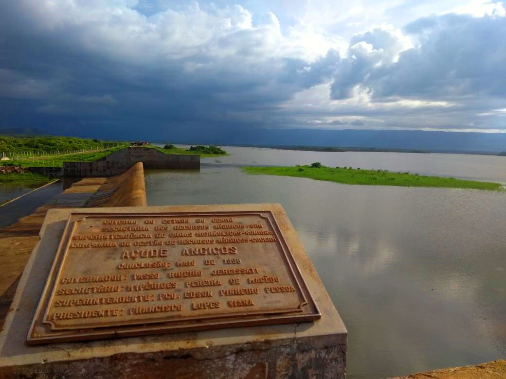 Açudes do Ceará, Angicos, em Coreaú e Frecheirinha.